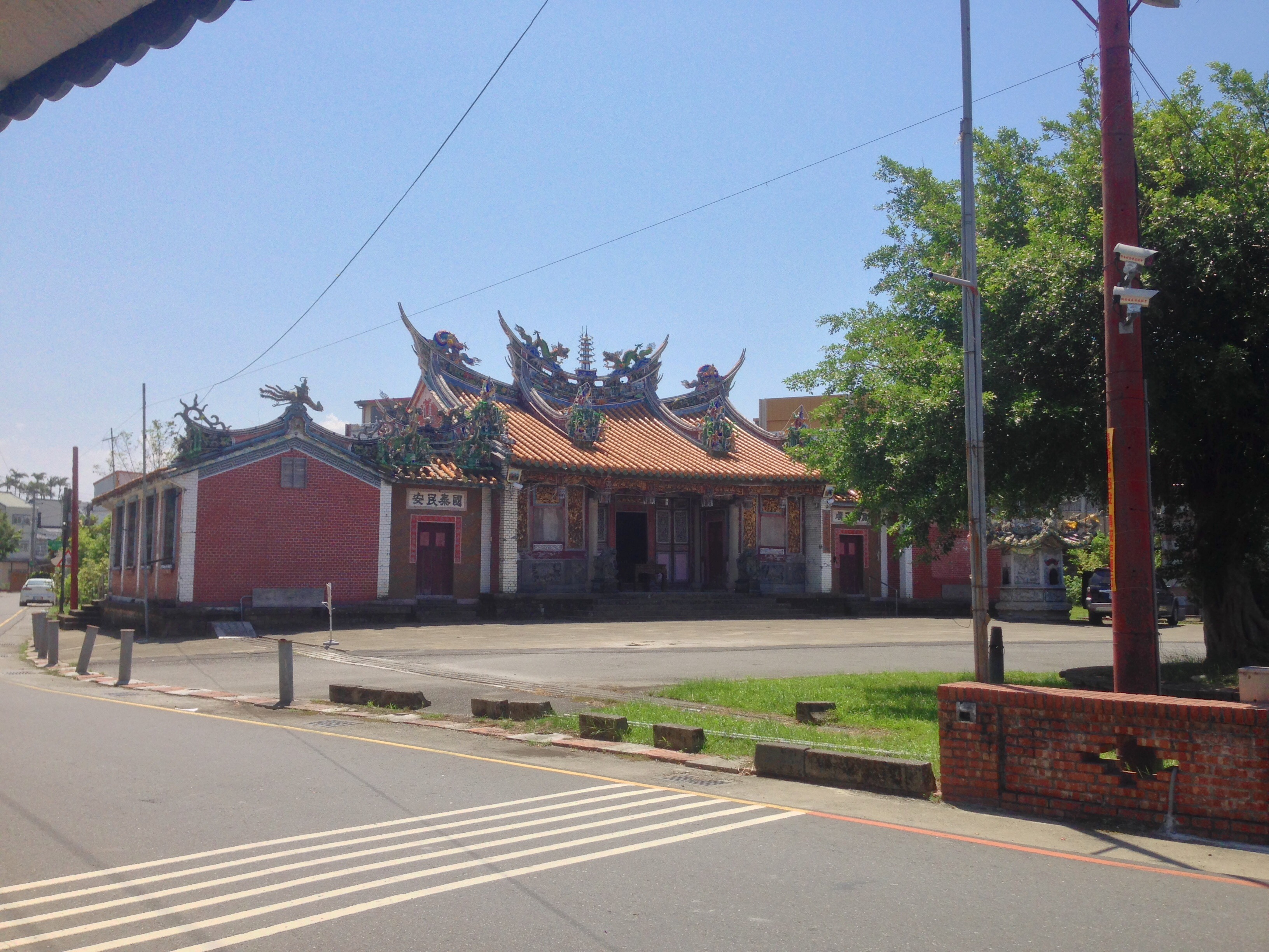 二結王公廟斜照